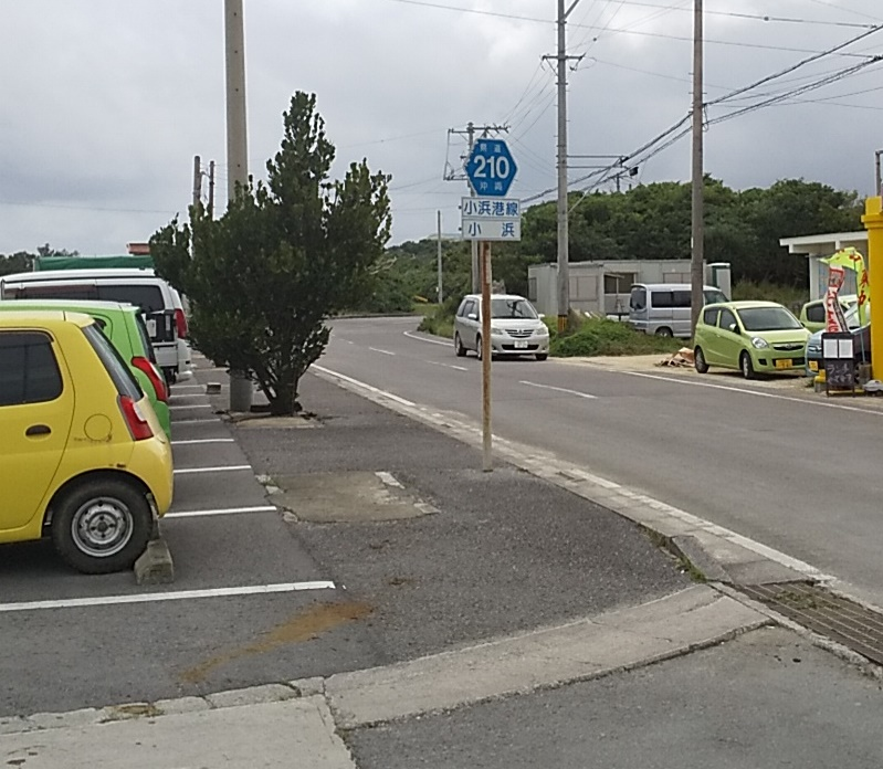 小浜島にて撮影